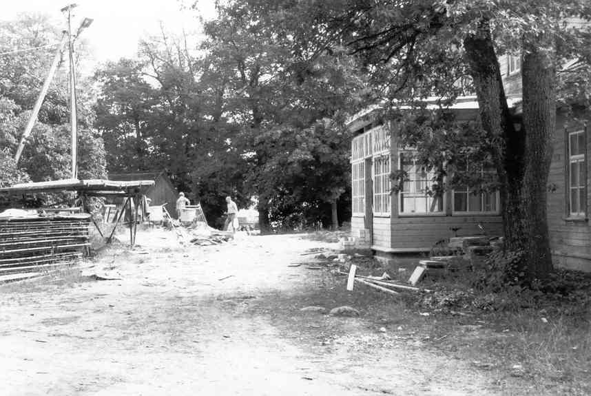 Birkas herrgård upprustas på Nuckö